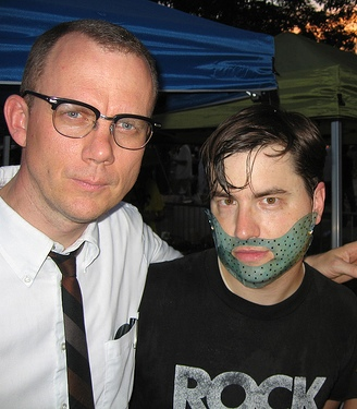 Matmos